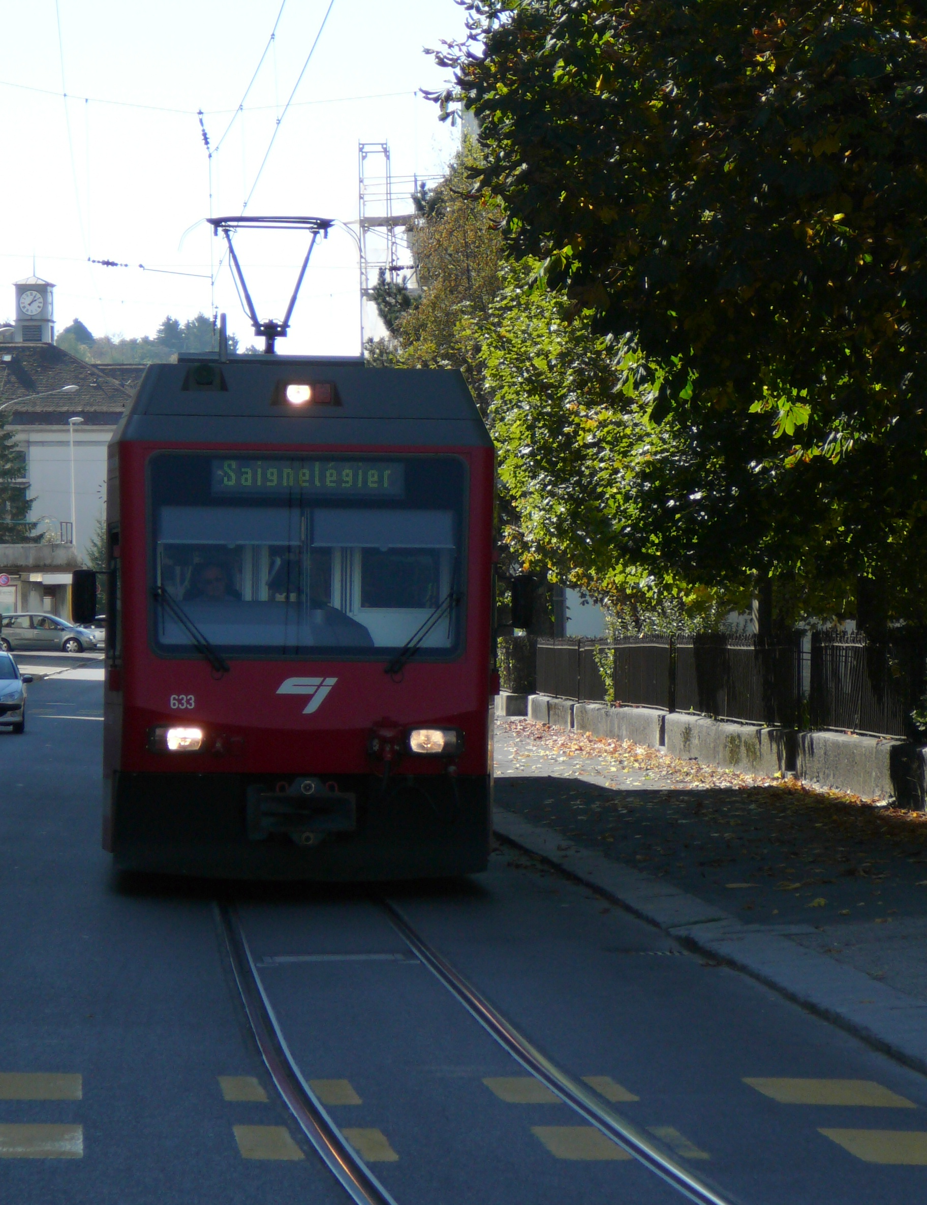 tramway des CJ à La Chaux de Fonds